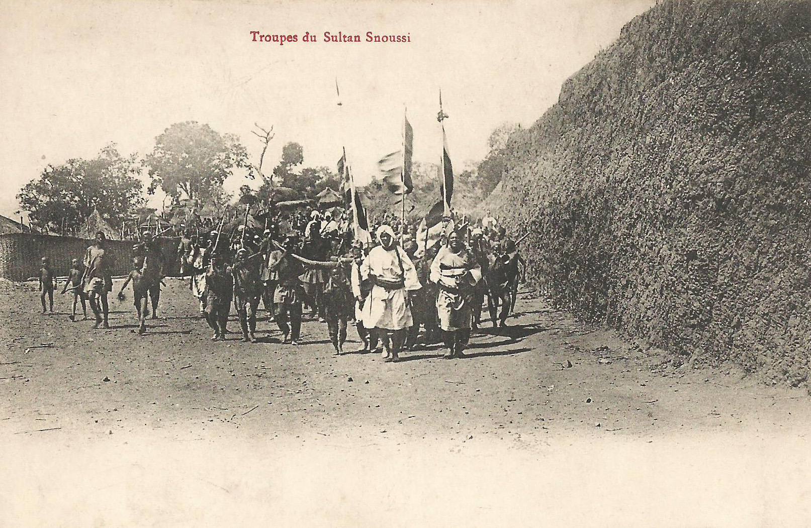 Troupes du Sultan Snoussi [Mohamed es-Senoussi] Carte postale ancienne, sans indication d'auteur, d'éditeur ou de date. Collection particulière